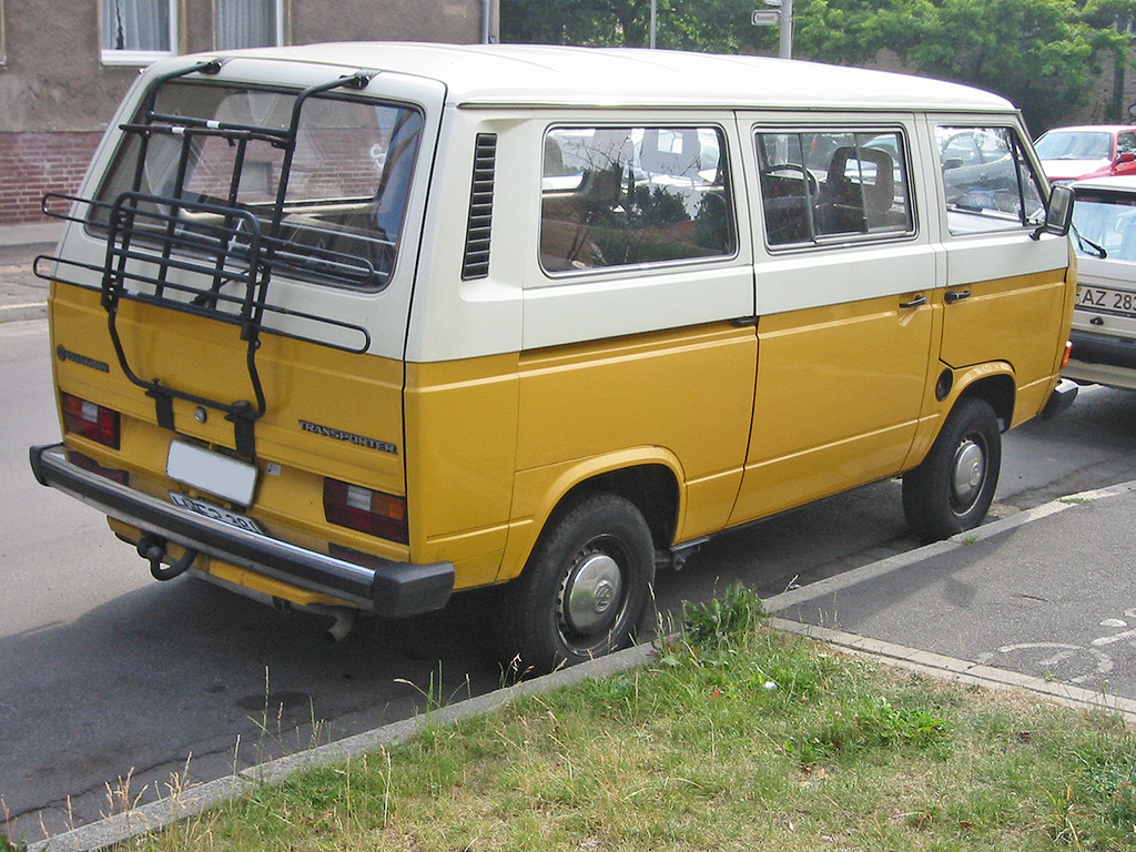 VW Transporter T3, wassergekühlt